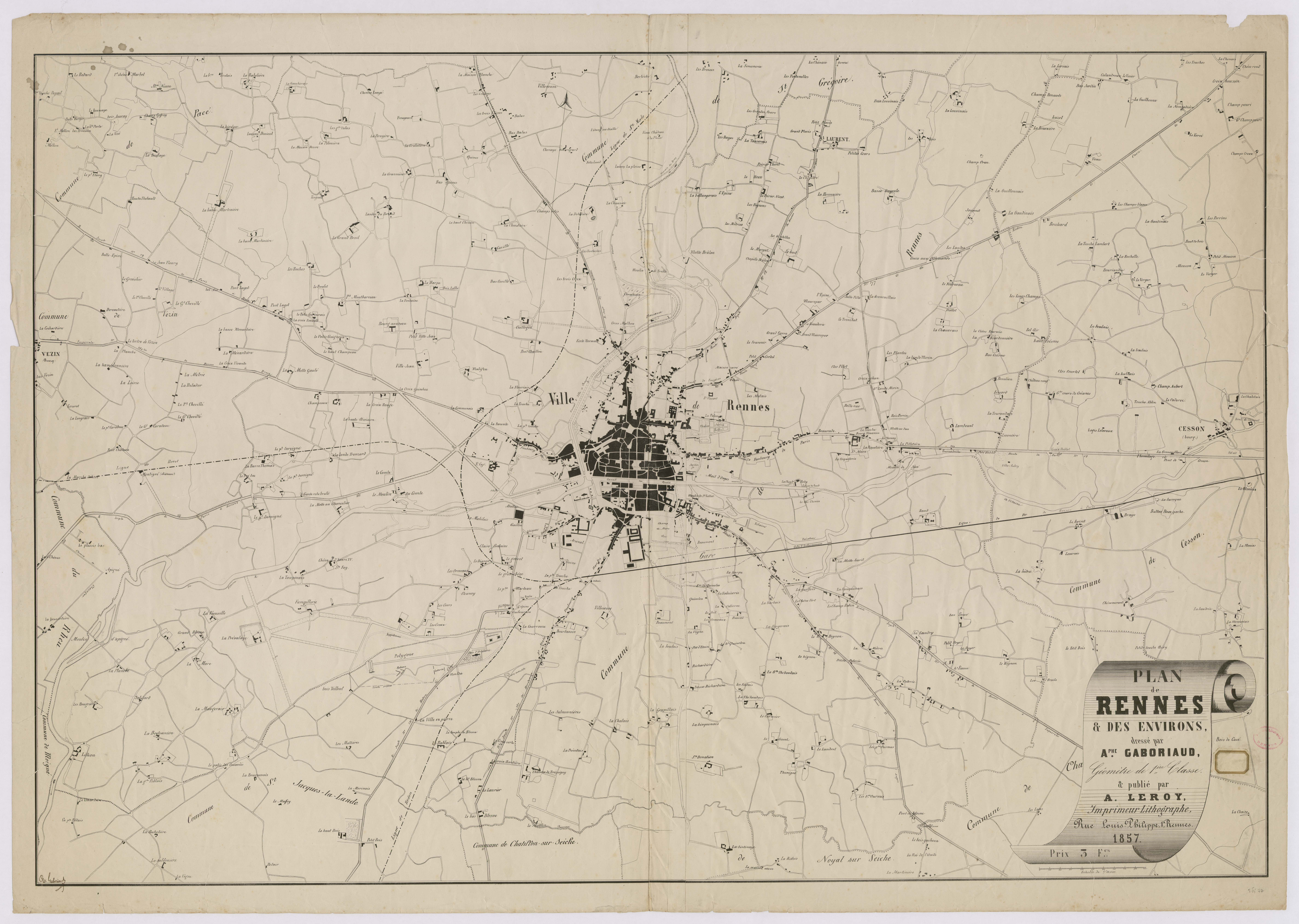 Plan de rennes et des environs en 1857.